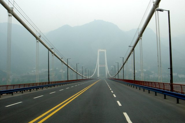 Xiling Bridge deck